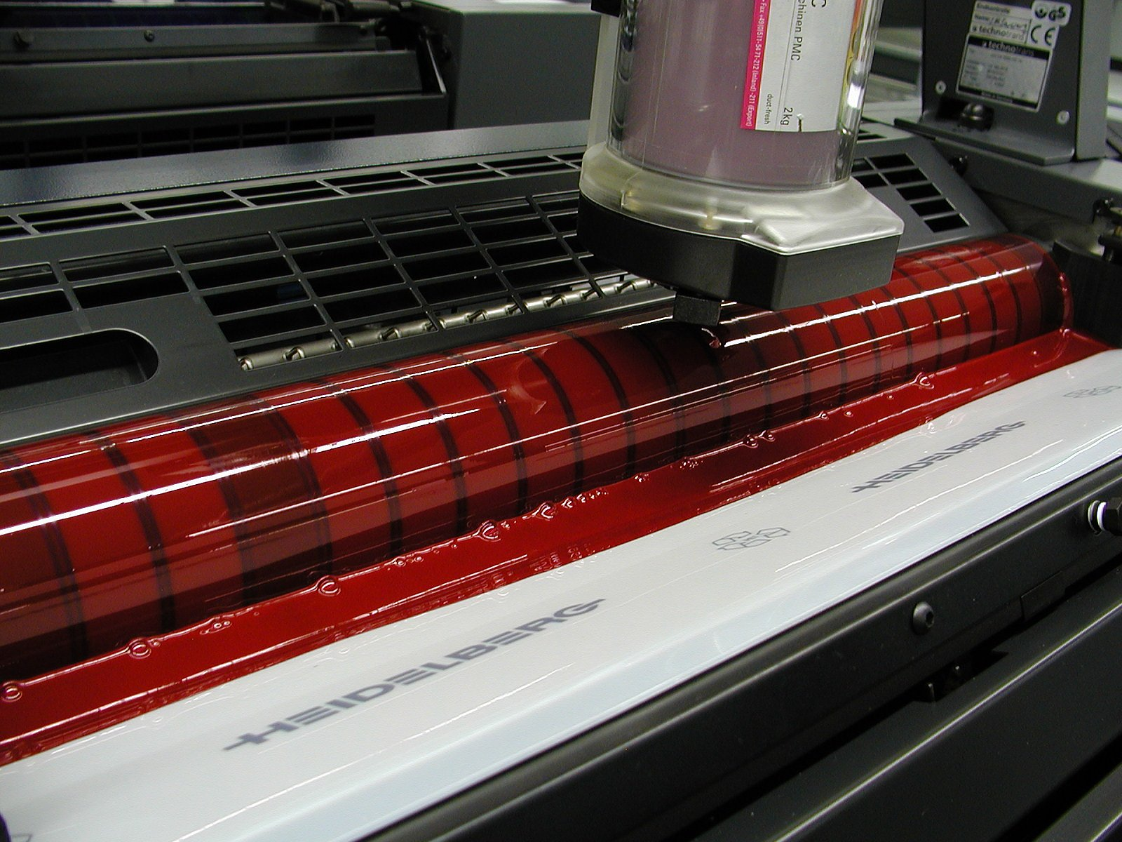 das Farbwerk eine Druckmaschine der Firma Heidelberger Druckmaschinen